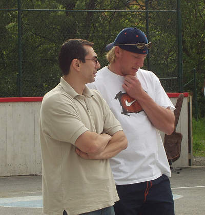 Marián Hossa in Nesluša, Slovakia